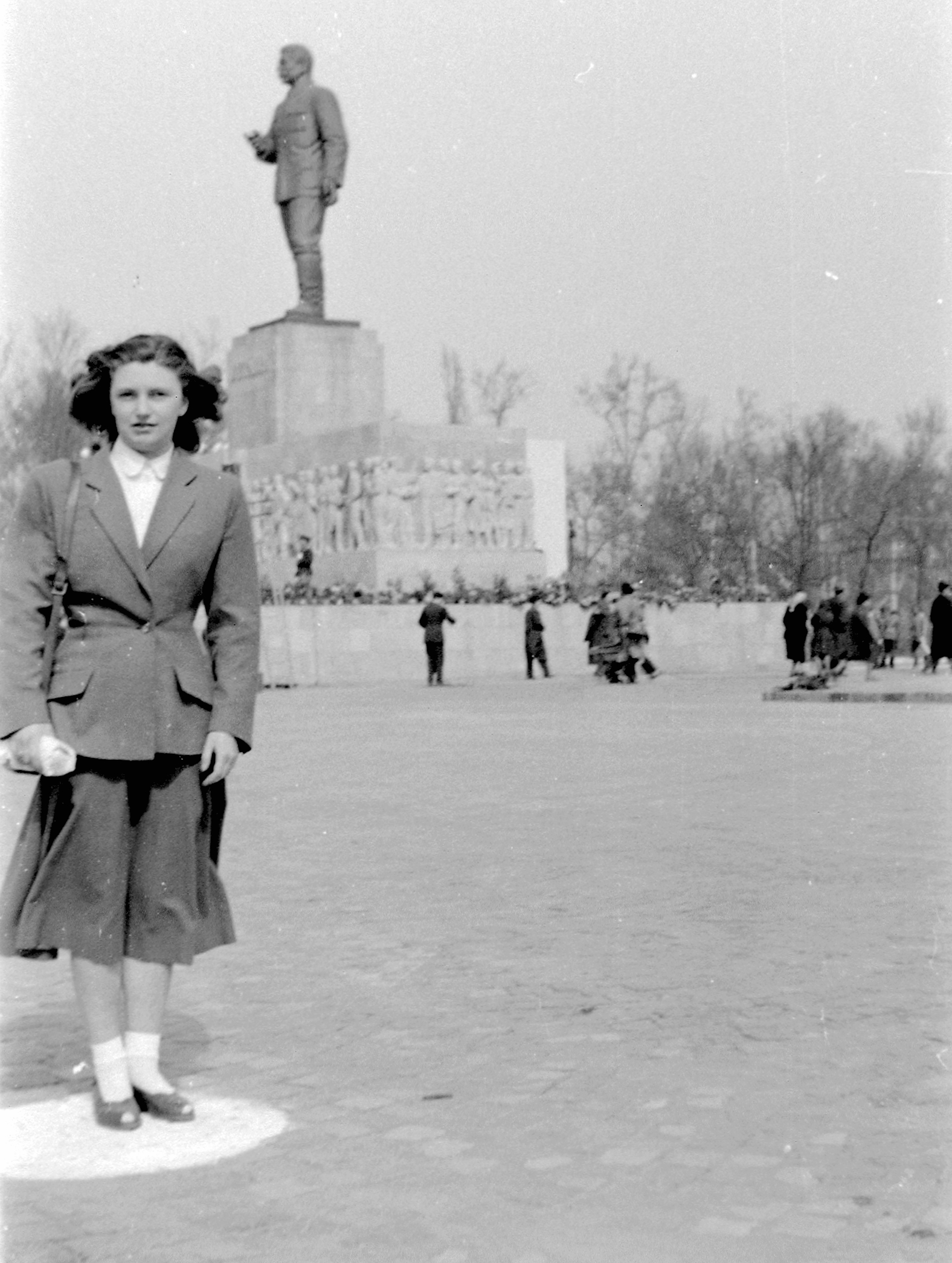 Ötvenhatosok tere (Felvonulási tér), háttérben a Sztálin szobor. Location: Hungary, Budapest XIV. Tags: sculpture, Budapest, Joseph Stalin portrayal Title: Ötvenhatosok tere (Felvonulási tér), háttérben a Sztálin szobor.